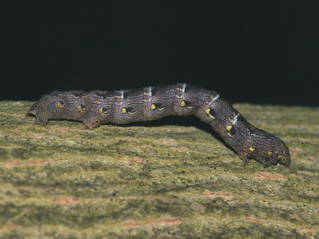 Exemplar found: Russia, Moscow Oblast, Serebryano-Prudsky District, near station 152nd kilometer, 03.06.2010, on common oak (Quercus robur) bark, days МО, Серебряно-Прудский р-н, окрестности платформы 152 км., 03.06.2010, на коре дуба, днём